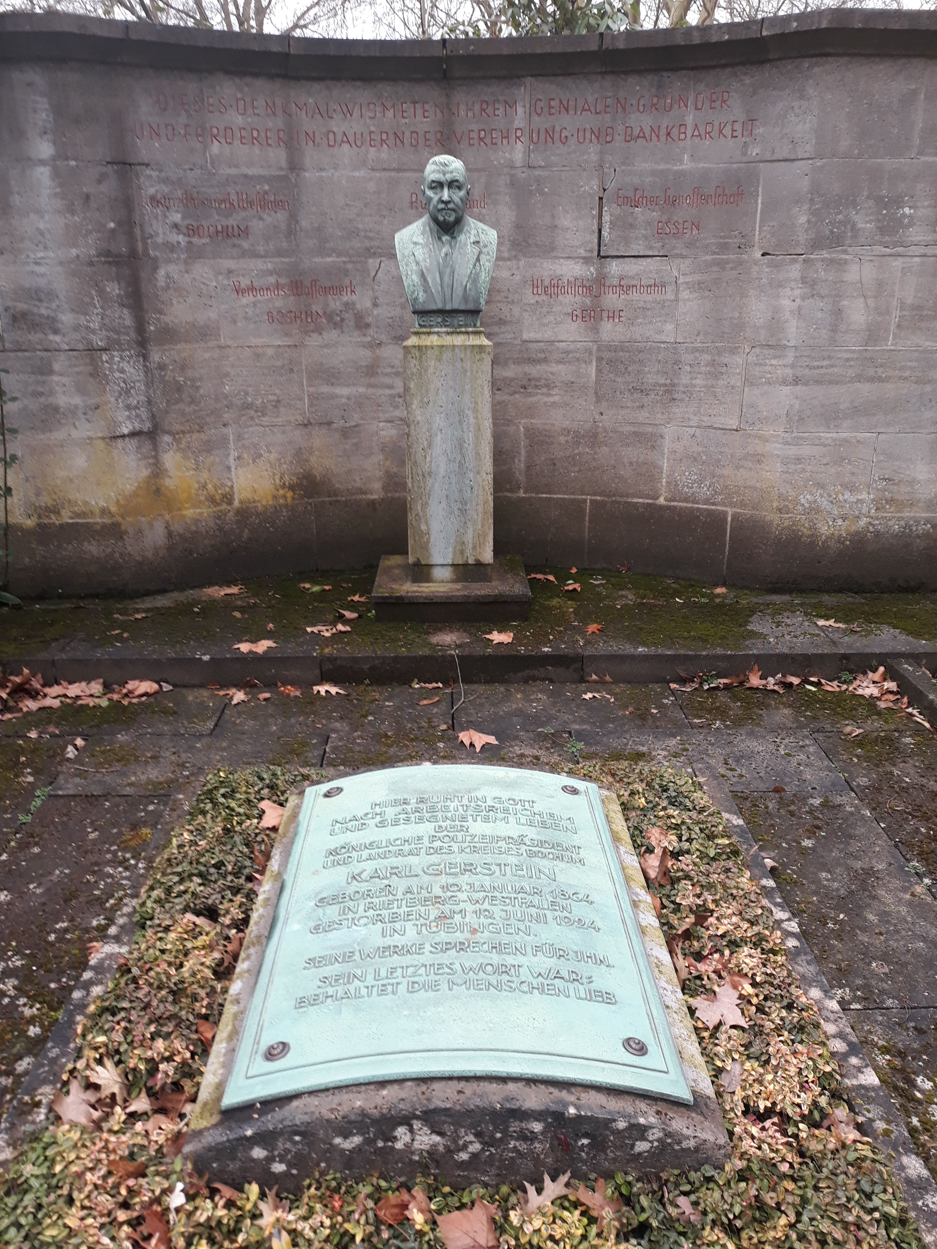 Das Grab des deutschen Politikers und Beamten Karl Gerstein auf dem Blumenfriedhof Bochum.